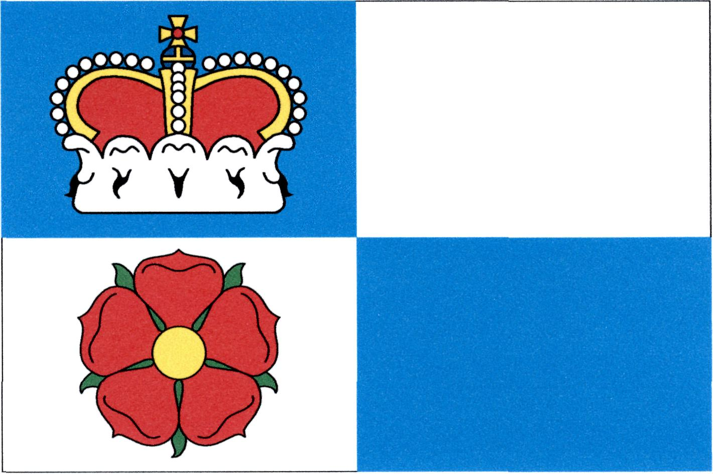 Vlajka obce Domanín (okres Jindřichův Hradec)